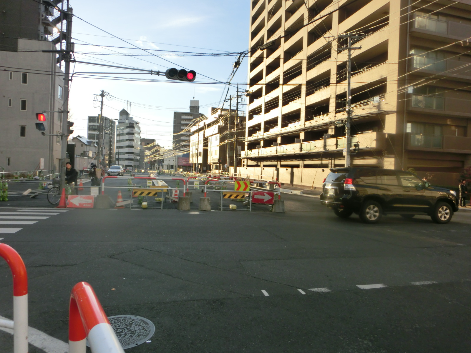 旧中山道との交差点から見た工事中の第2工区。現在は一方通行である。